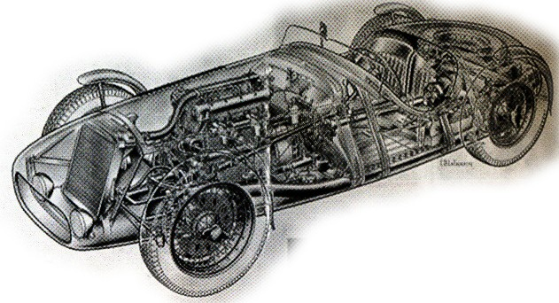 Disegno bandini offhnauser 1500 sport siluro tratta da Libro: Bandini (storia della vita e automobili di Ilario Bandini)